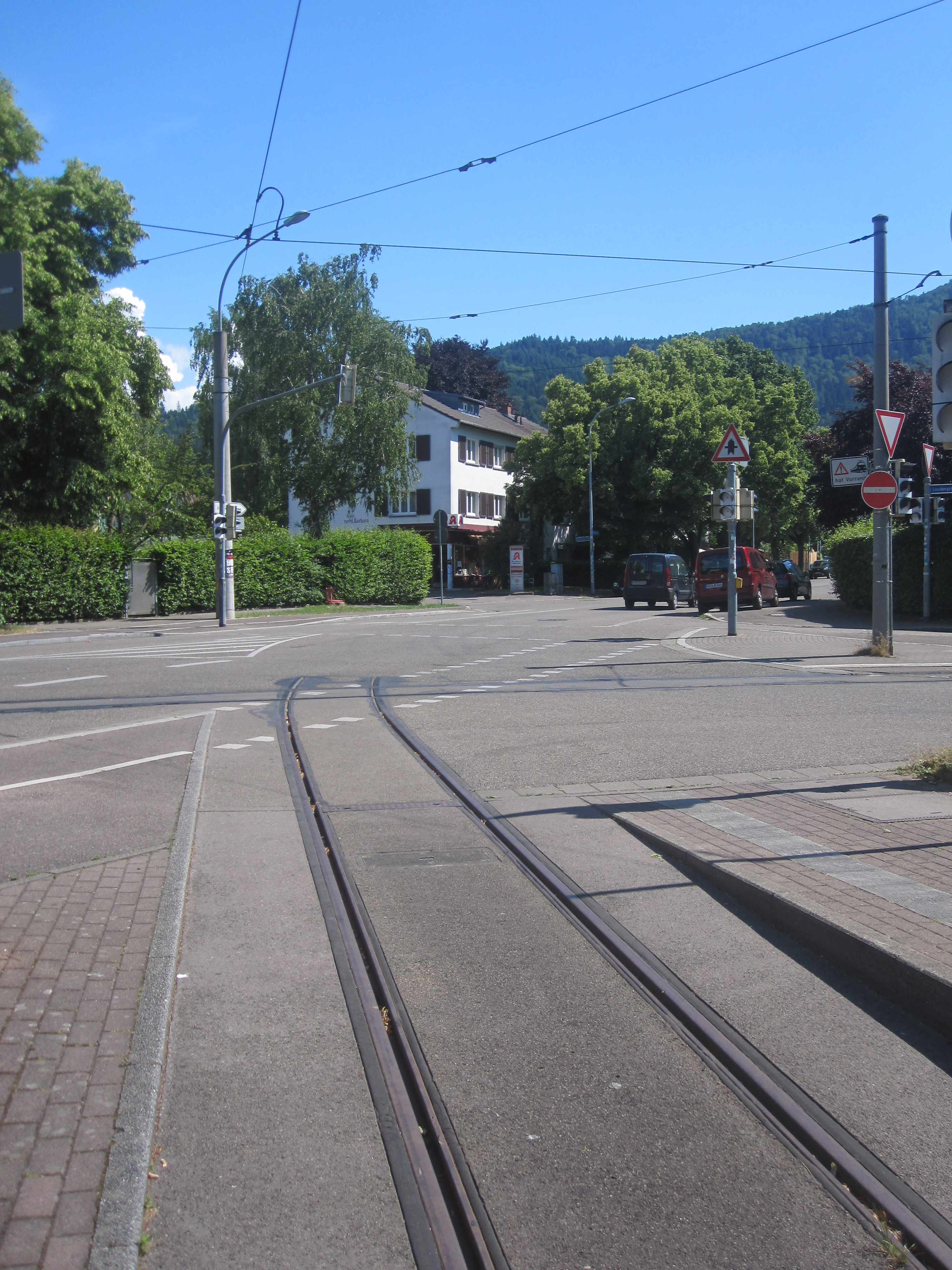 Stumpfgleis an der Lassbergstraße in Richtung Bahnhof Littenweiler, Freiburg